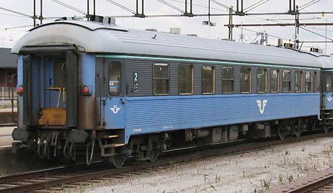 Exteriör på personvagn av typ B5